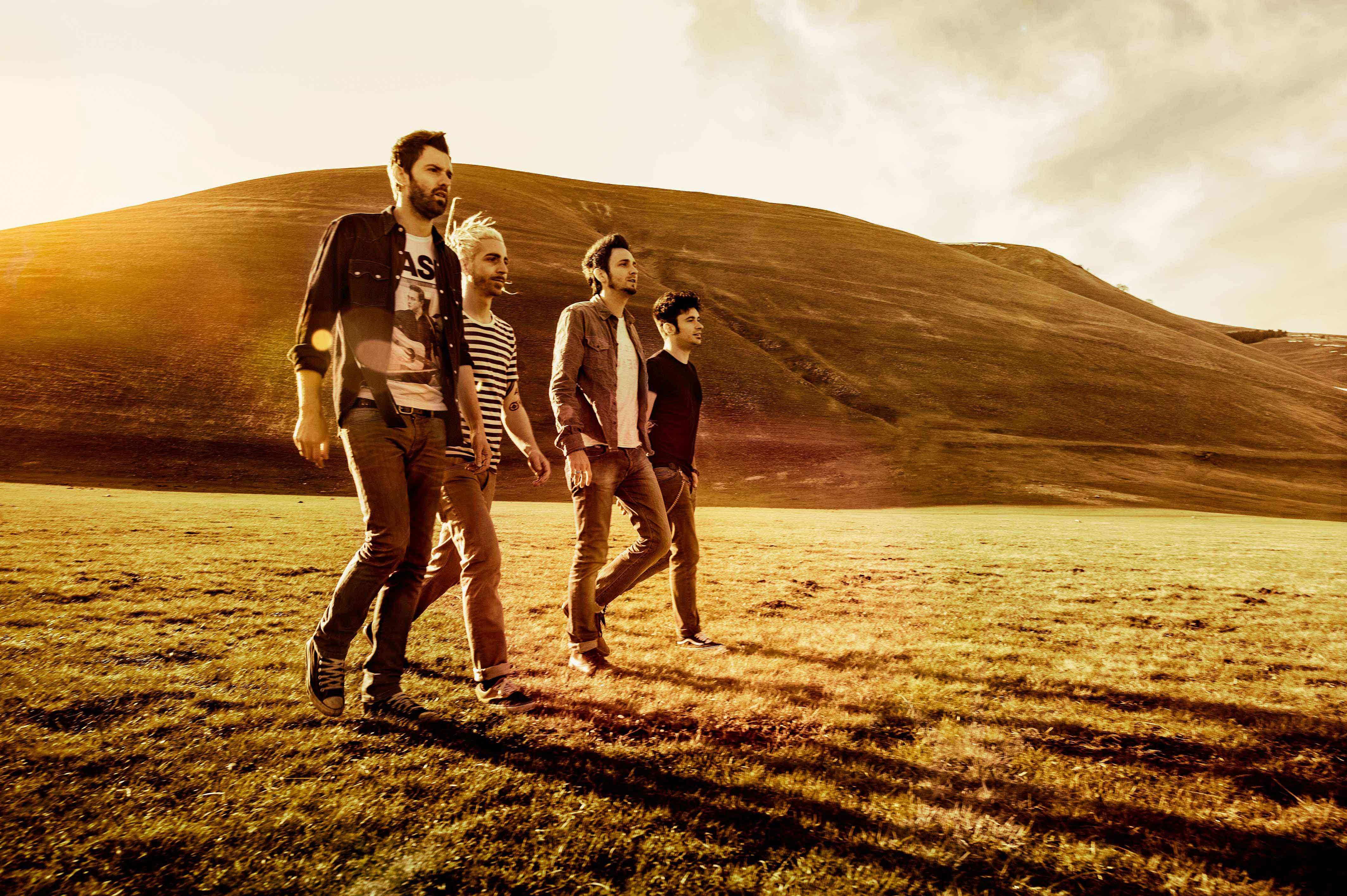 The Sun - foto promozione album Luce